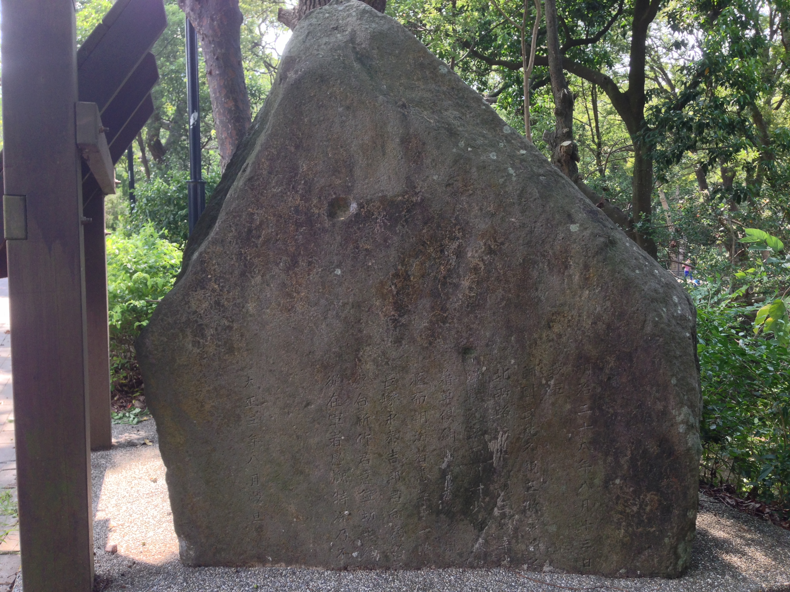 苗栗市貓貍山公園北白川宮能久親王殿下駐馬碑